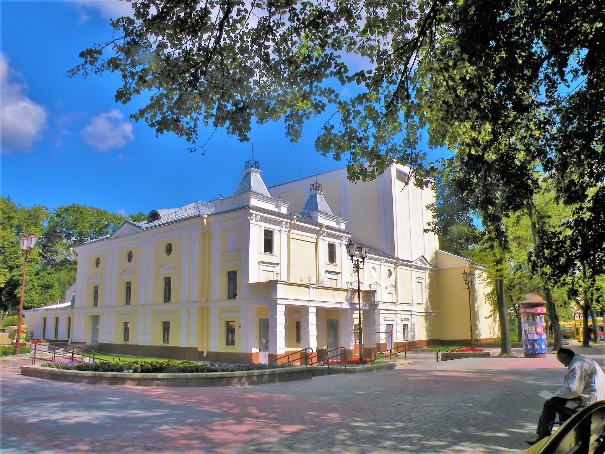 Гродненский областной театр кукол в Гродно, Беларусь. Расположен в городском парке культуры и отдыха им. Ж.-Э. Жилибера по адресу ул. Дзержинского, 1/1.